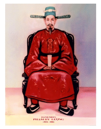 Phó bảng Phạm Hy Lượng (1834- 1886) Ảnh lấy theo sách "Phạm Hy Lượng, cuộc đời và tác phẩm" của Nhà xuất bản Văn hóa thông tin phối hợp với Hội khoa học lịch sử Việt Nam xuất bản năm 1997.